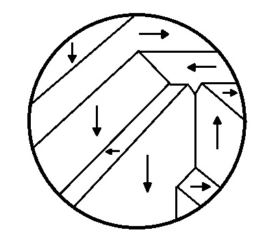 Sont représentés sur ce schéma différents domaines magnétiques séparés par des parois, identifiées grâce à la méthode de Bitter.